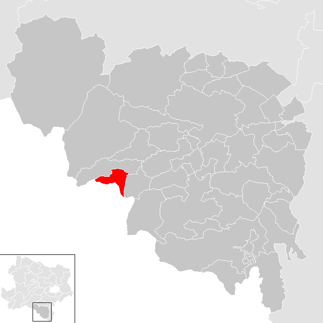 Bezirk Neunkirchen